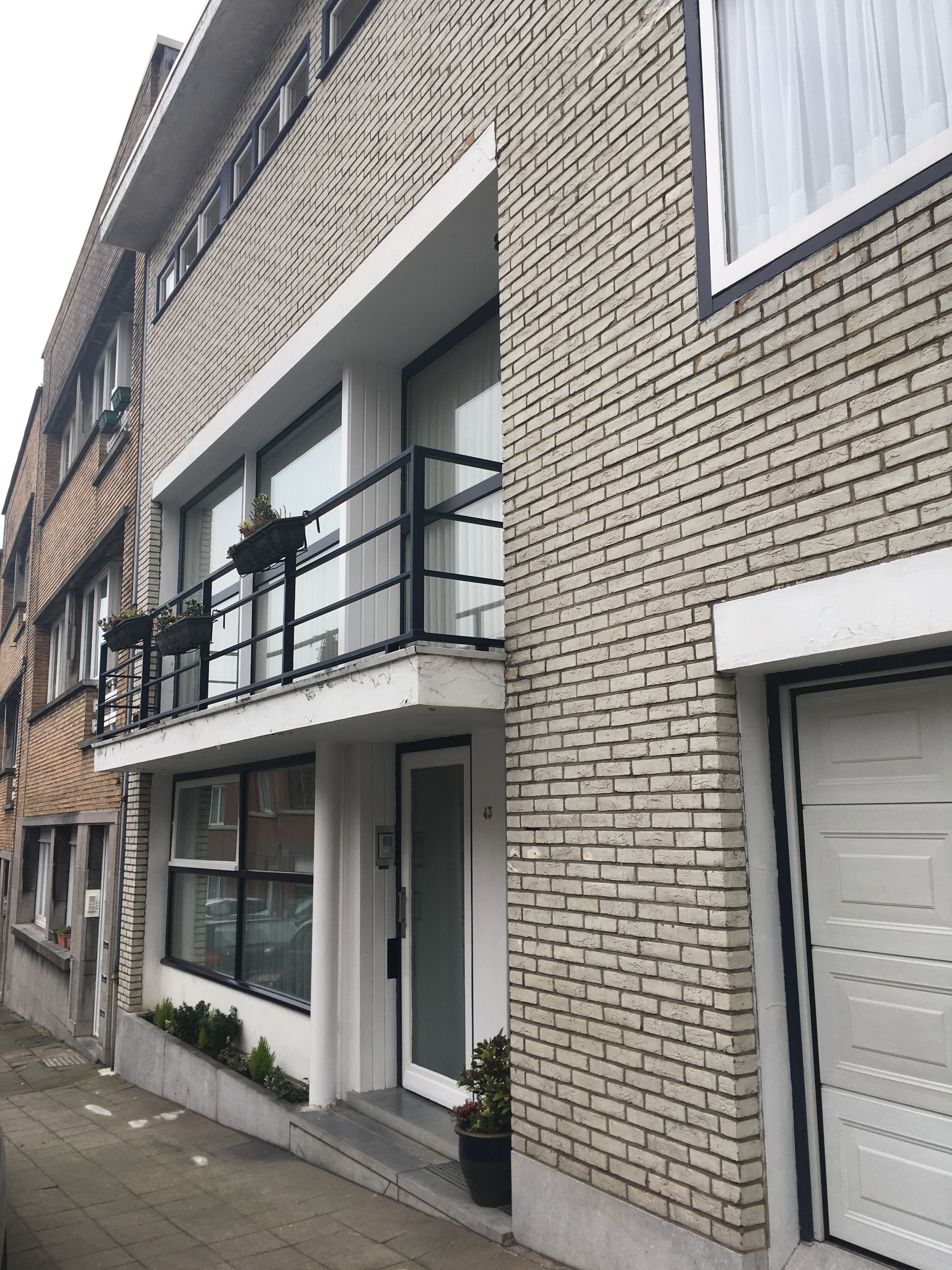 Retrait dans la façade côté rue